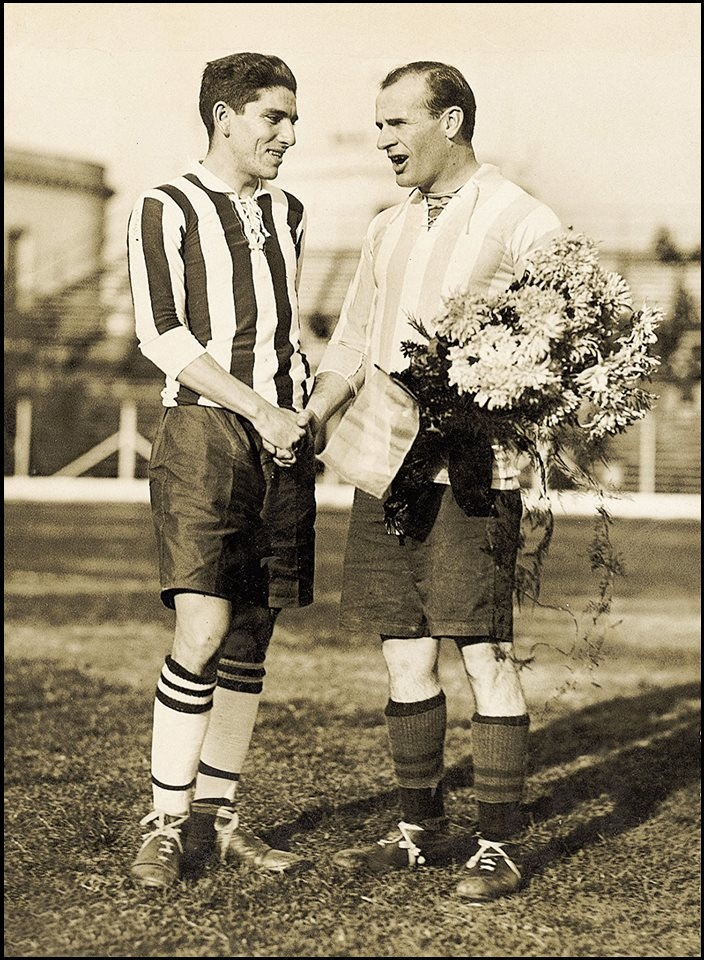 Emilio Solari, capitán de la Seleccion Argentina y Nueva Chicago. Campeón de la V edición de la copa America en 1921.